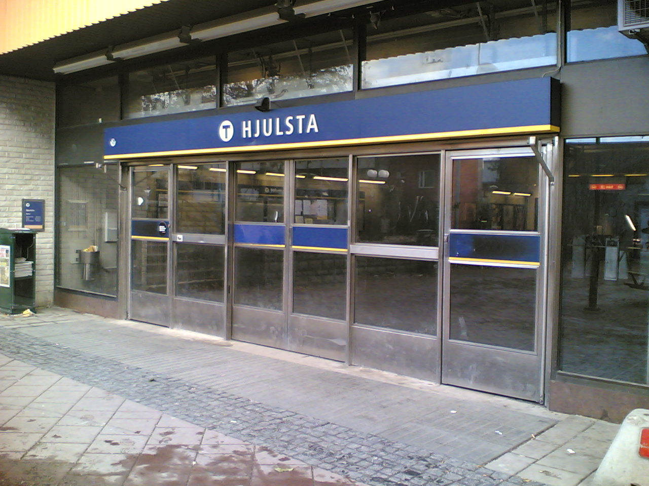 Tunnelbana's Hjulsta station enter, Stockholm.